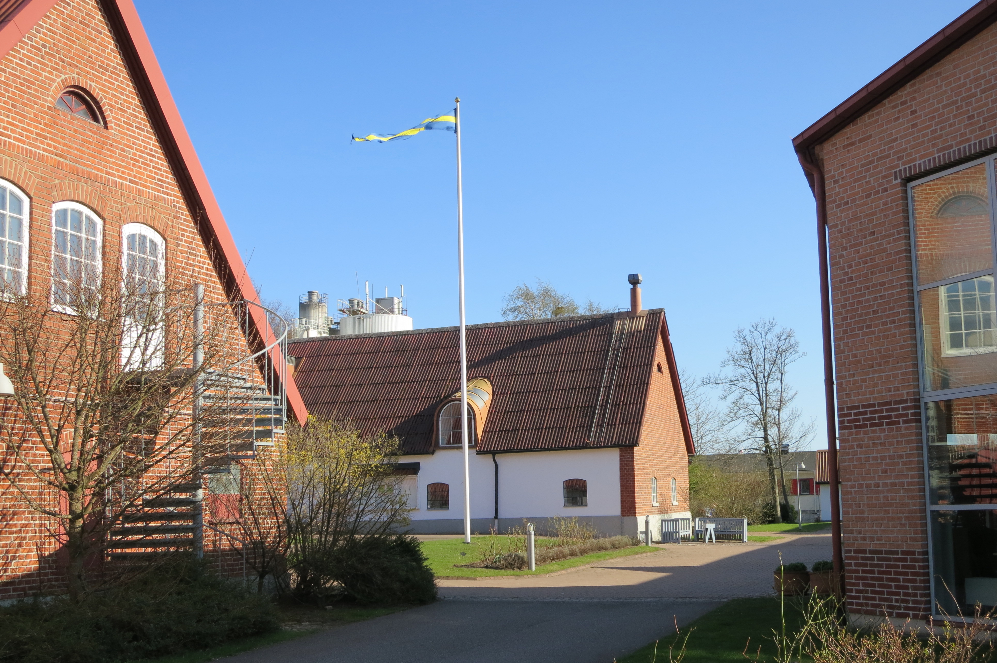 Malmö folkhögskola, belägen i Malmö.